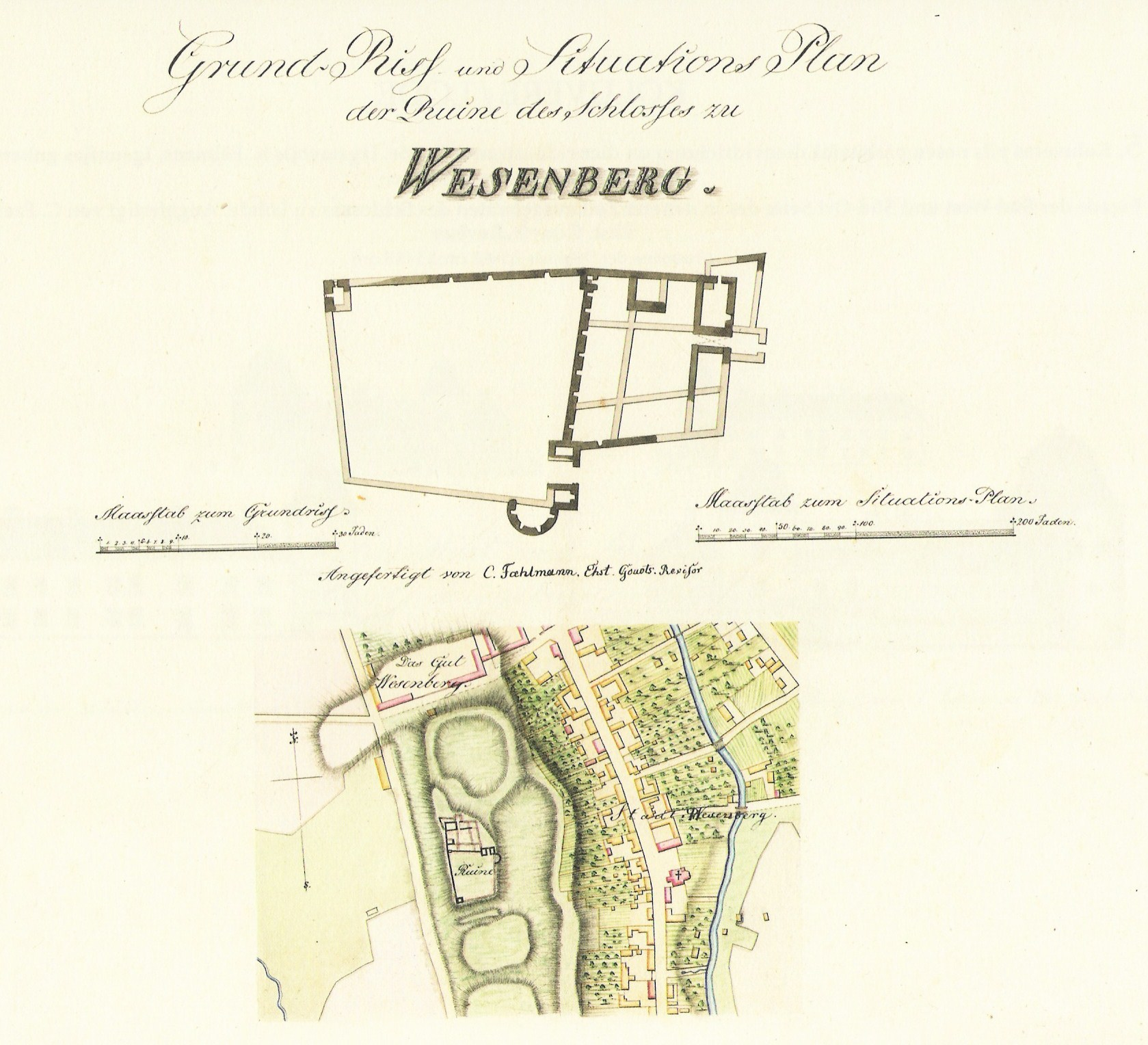 Rakvere linnuse asendiplaan. Paulucci album